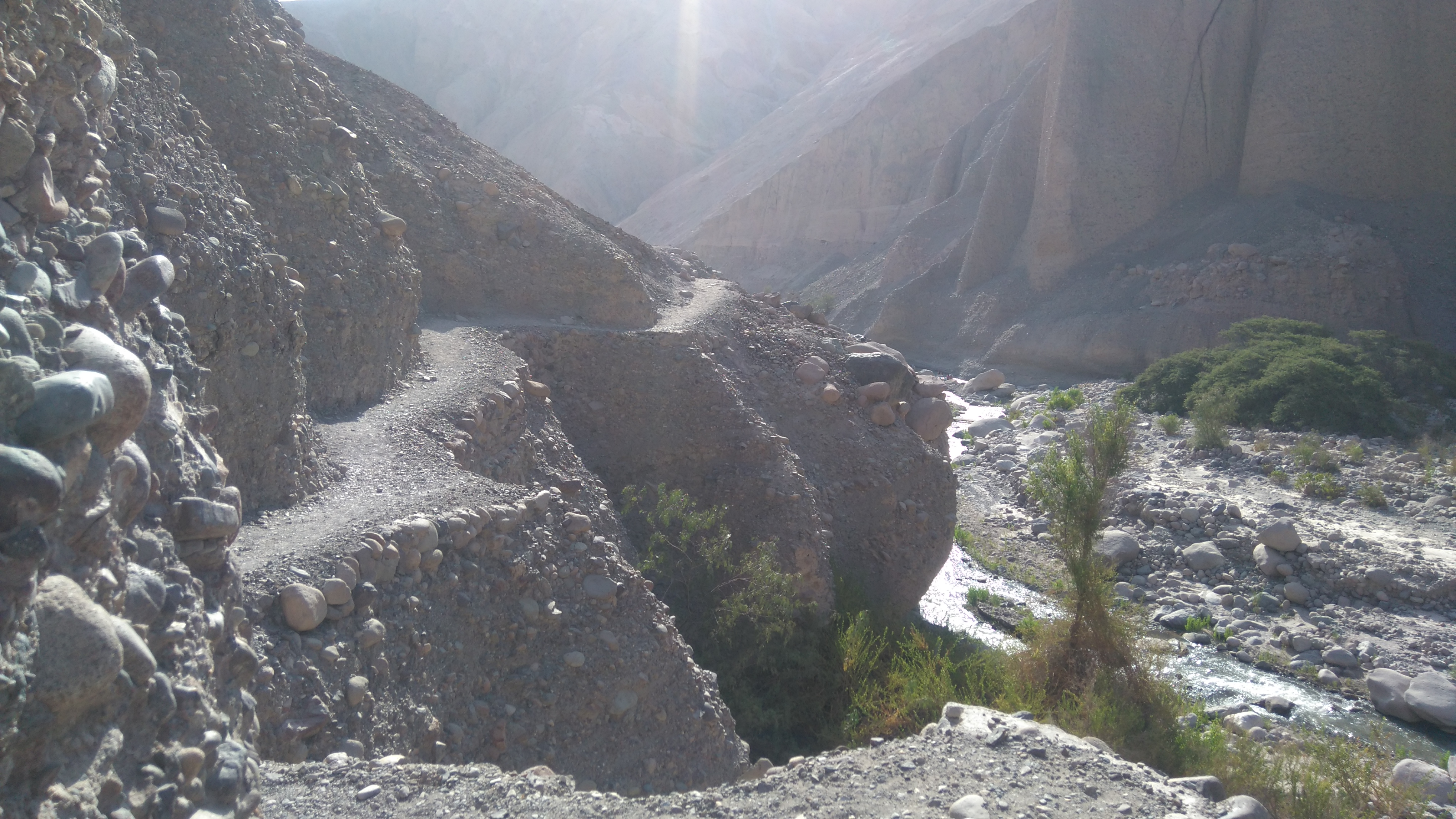 Camino al santuario de las virgen de las peñas, por las quebrada del valle.